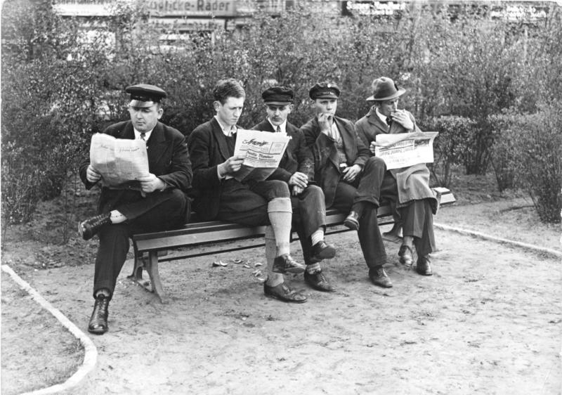 Arbeitslose SA-Männer auf einer Tiergartenbank.